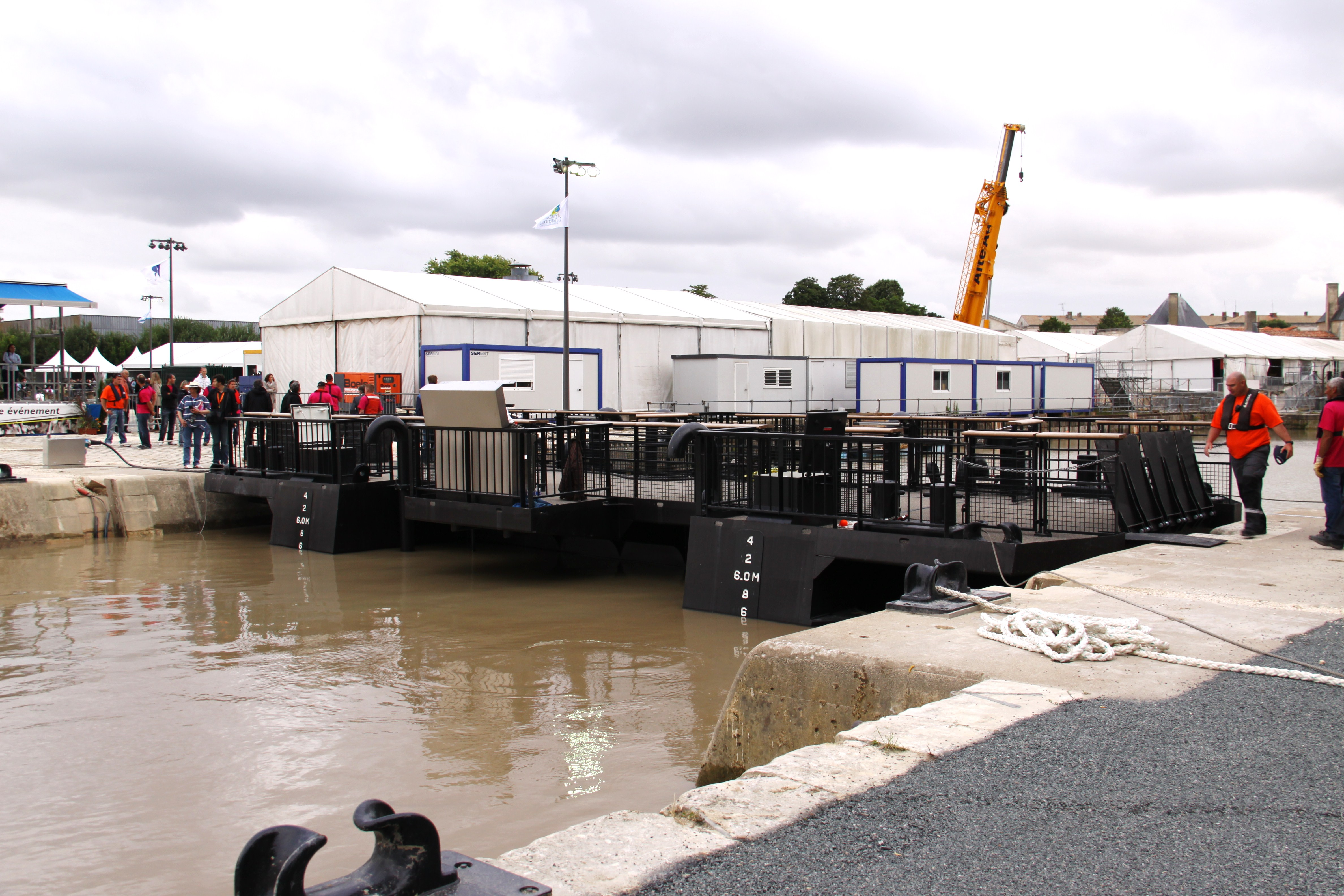 Le bateau-porte complètement descendu dans l' eau. Rochefort-sur-Mer, Charente Maritime, France.